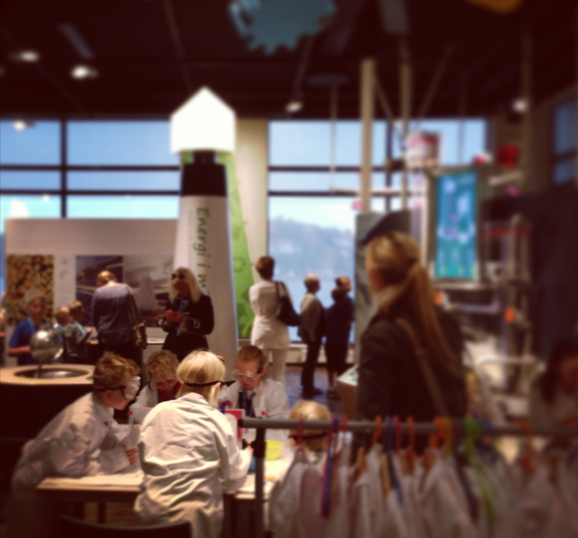 Utstilling hos Vitensenteret Sørlandet